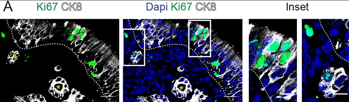 Fig. 3. Diferentes poblaciones celulares proliferantes de la mucosa olfativa OM. En A, a la izquierda inmunotinción de la OM para Ki67 y CK8. La Ki67 es una proteína nuclear expresada en todas las fases del ciclo celular, excepto durante la fase de reposo y el comienzo de la fase G1. En el centro, misma área con tinción de Dapi (azul). Los recuadros se agrandan a la derecha: las células positivas en el epitelio olfativo y en la extrema derecha: glándula de Bowman en la lámina propia (abajo). Barra de escala= 20 μm y 10 μm en el recuadro.